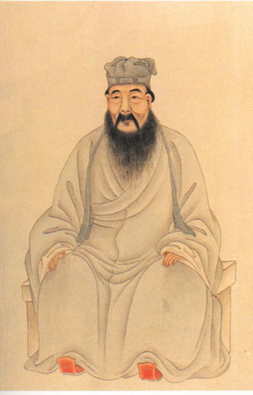 颜元，清代学者。Yan Yuan